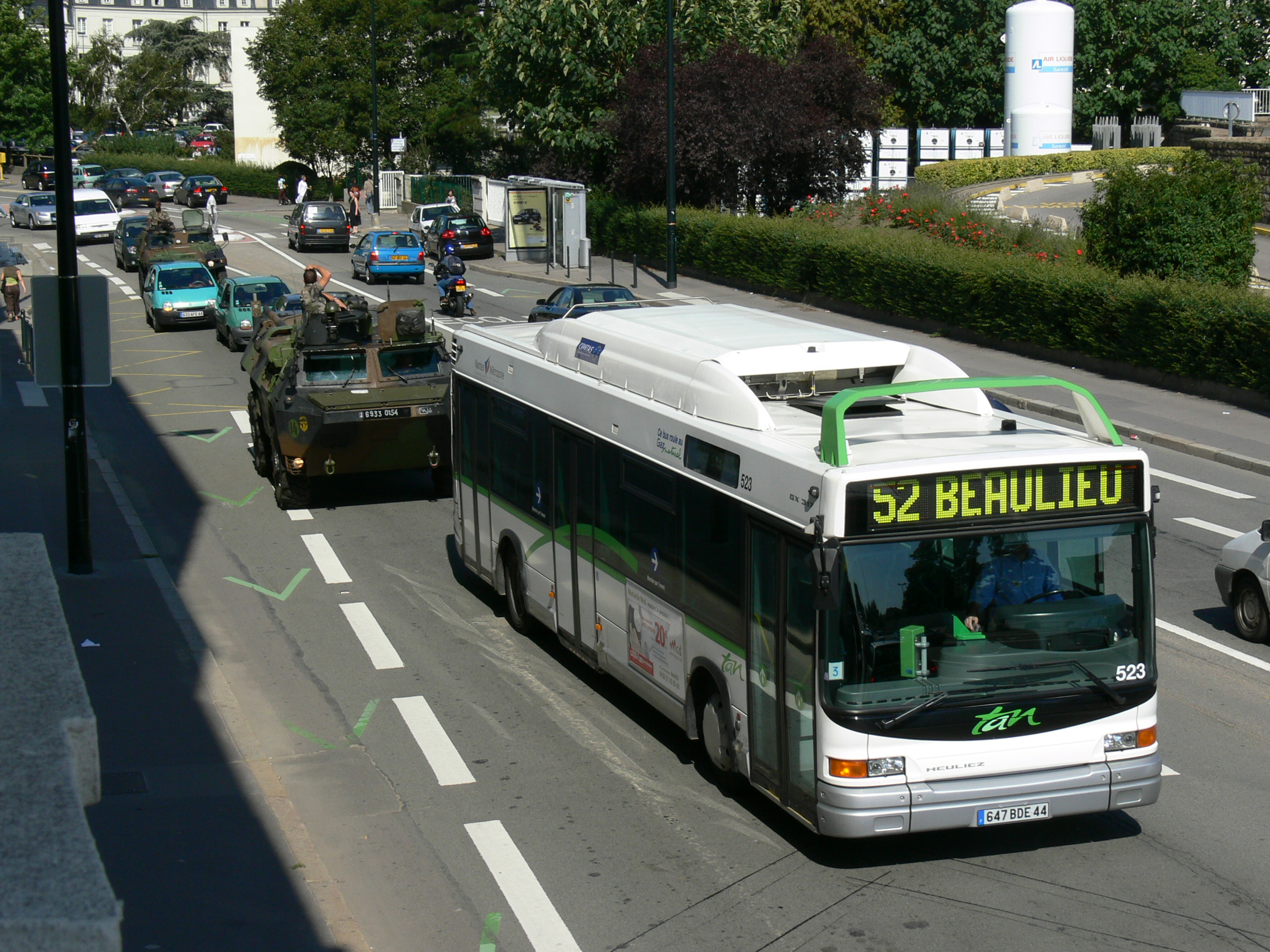 La ligne 52 du bus de Nantes en direction de Beaulieu. En ce moment, le terminus de cette ligne est Hôtel de Région situé sur la pointe est de l'Île de Nantes.